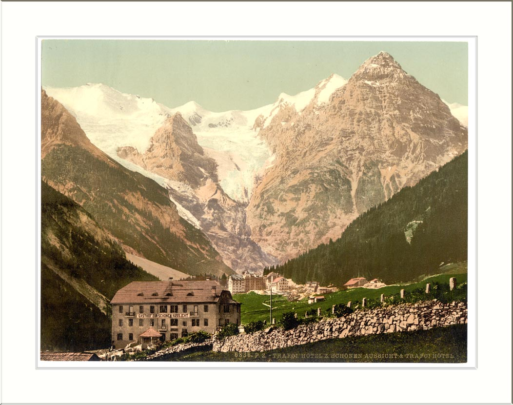 Trafoi Hotels Bellevue (i.e. Schönen Aussicht) and Trafoi Tyrol Austro-Hungary